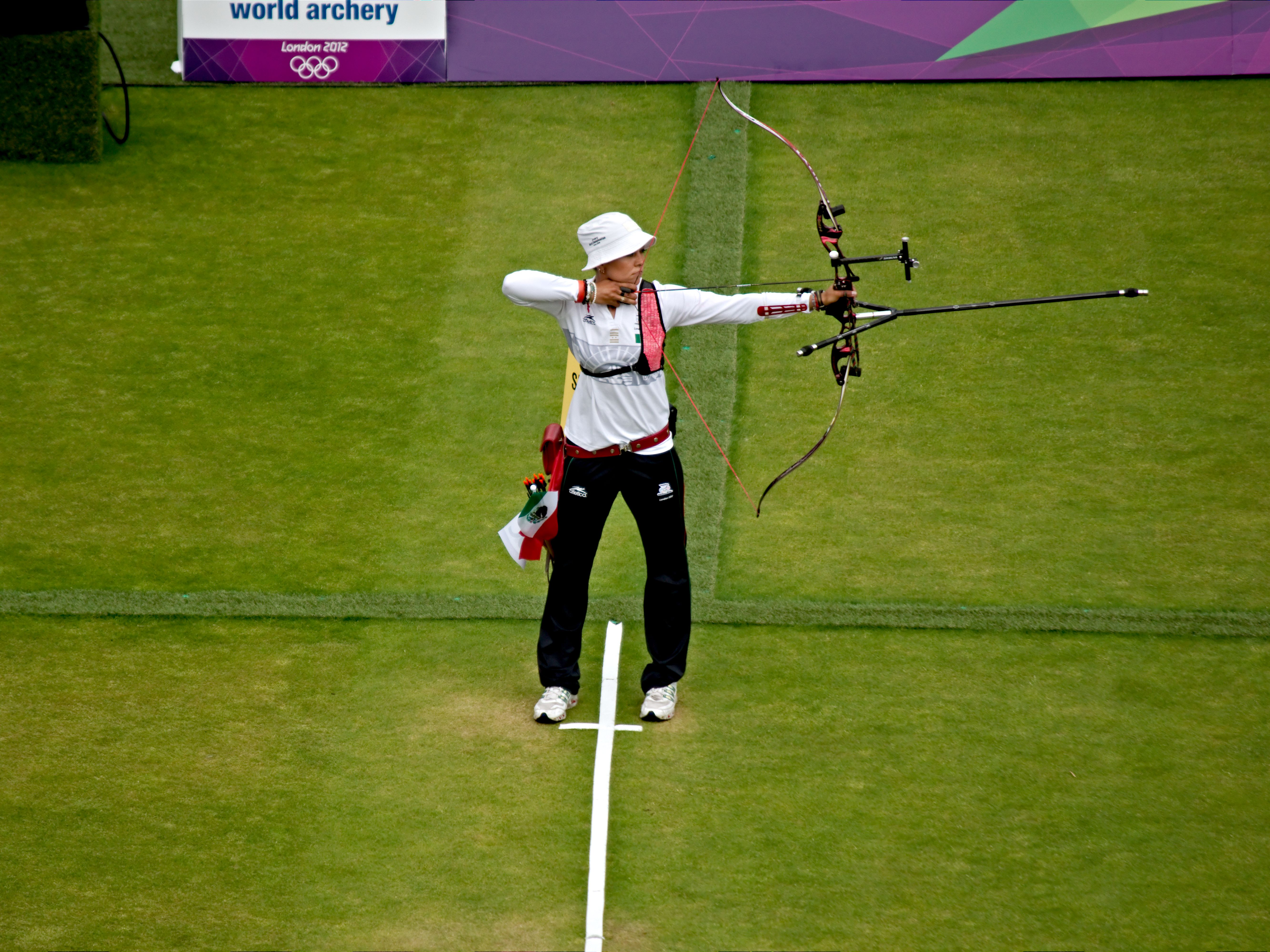 Aída Román Londres 2012 Cuartos de Final.